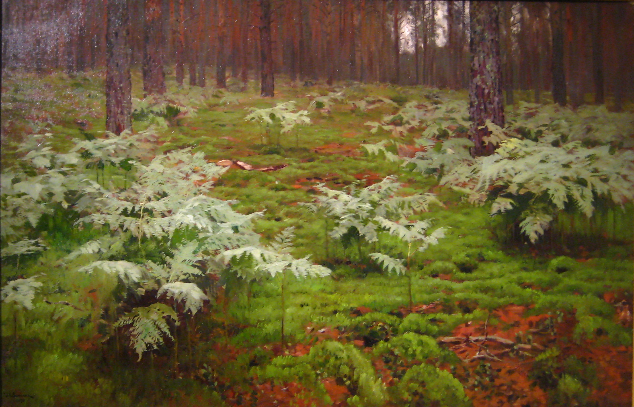 Исаак Левитан. Папоротники в лесу. 1895. Нижегородский художественный музей